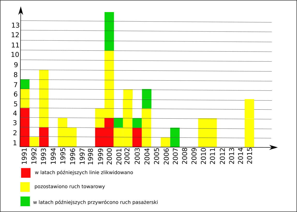 Diagram likwidacji stacji kolejowych w Polsce